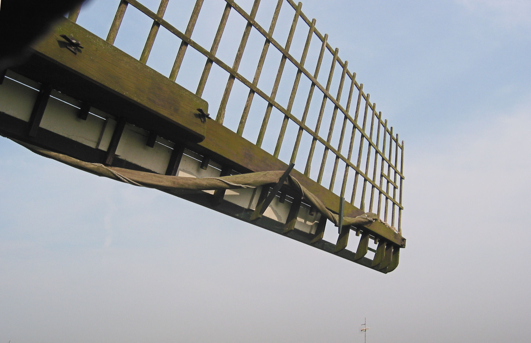 Doesburger molen te Ede 12 juni 2007